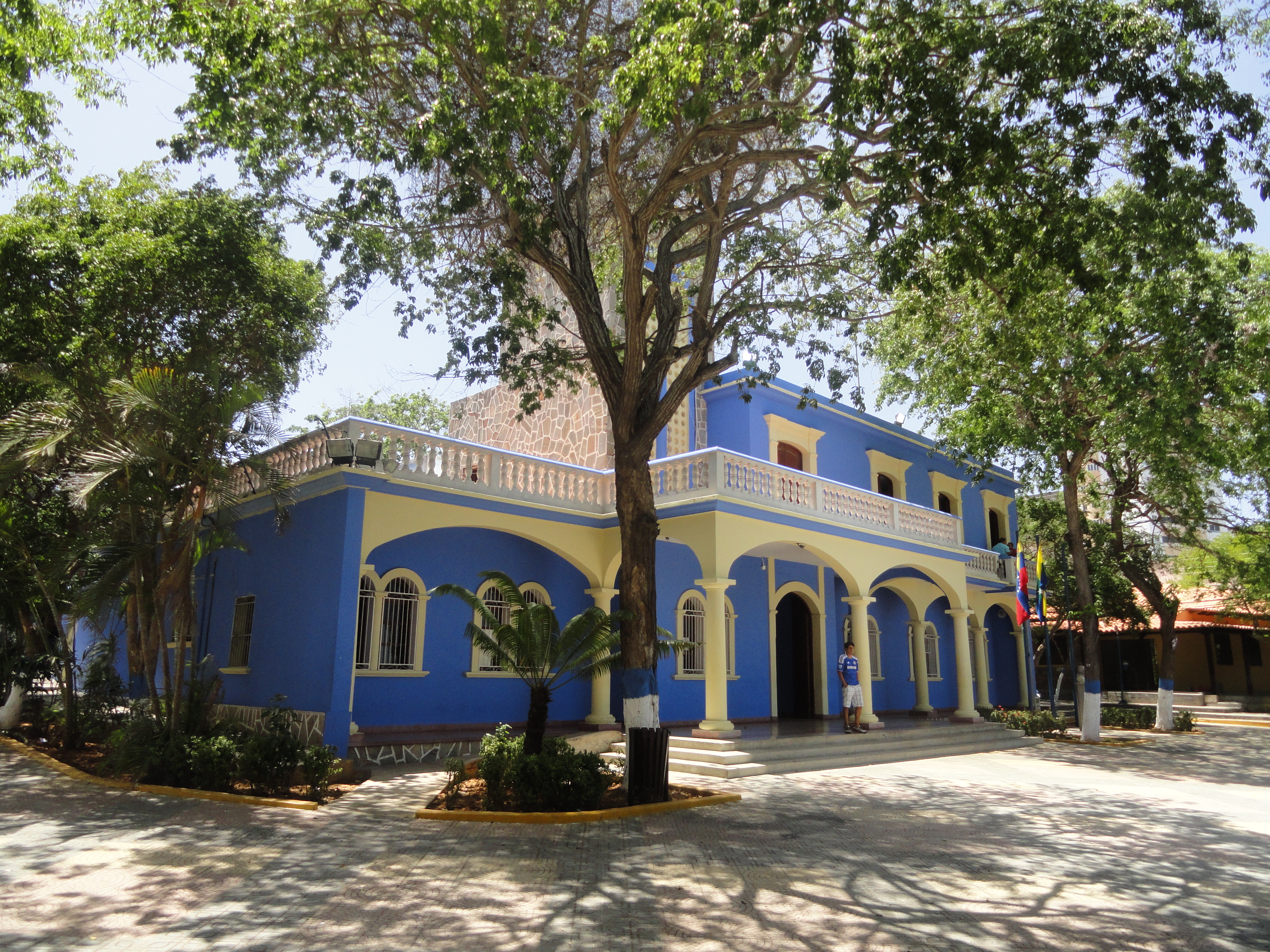 Concejo Municipal